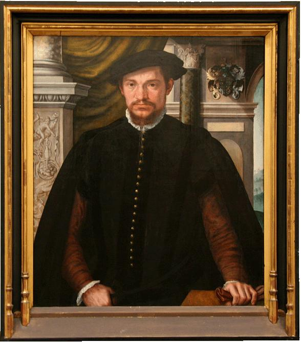 Guillaume de Norman le jeune (Wilhelm IV. von Norman), Kaiserlicher Gesandter und Rat, Vizeadmiral von Flandern, General-Steuereinnehmer von Artois, Picardie und Flandern, aus der Familie Norman.